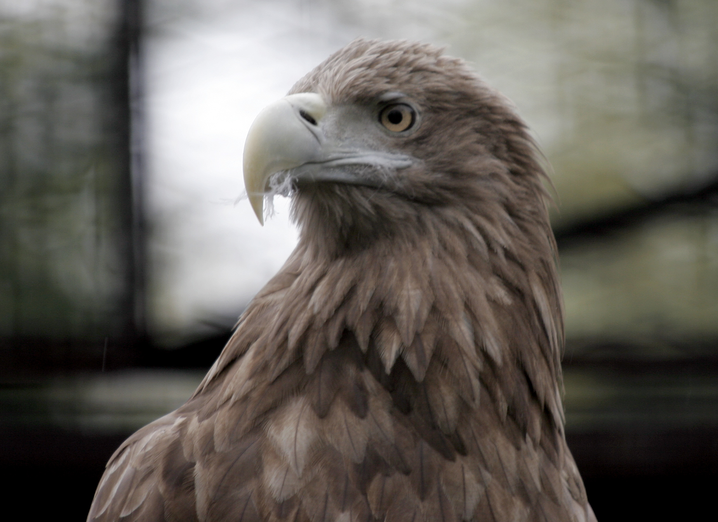 Orzeł bielik (Haliaeetus albicilla). Polska, Chorzów, WPKiW, Ogród Zoologiczny w Chorzowie